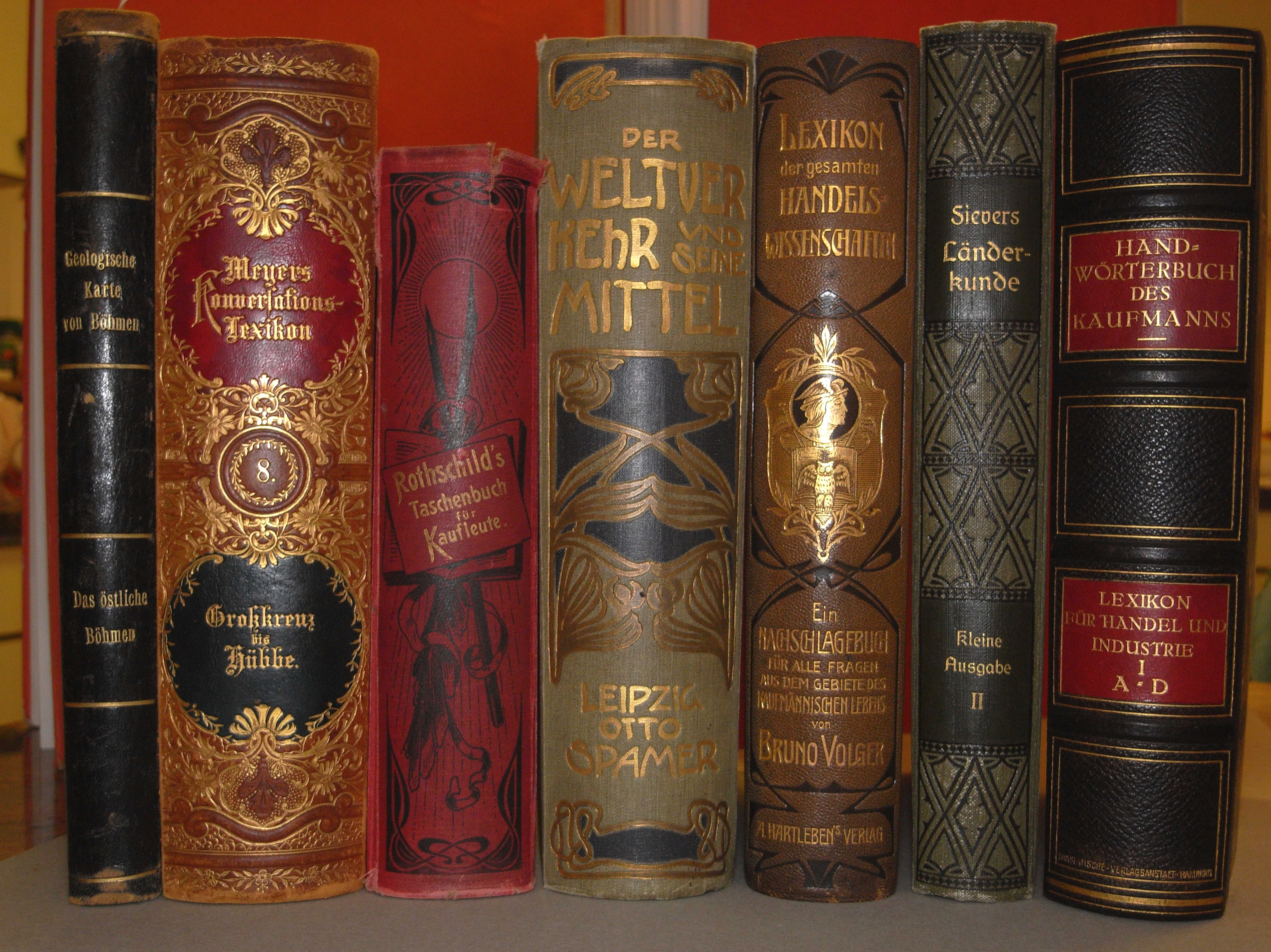 Rückentitel von Büchern (Einbandgestaltung)